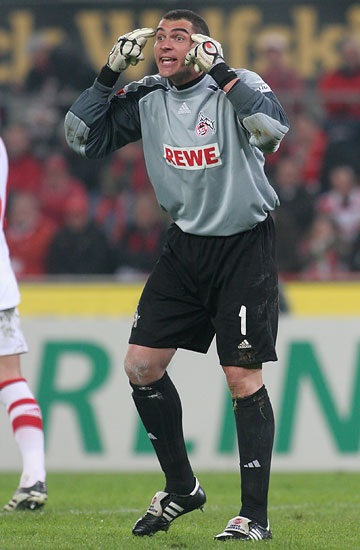 Faryd Mondragón - 27. Spieltag, Derby gegen Borussia Mönchengladbach.